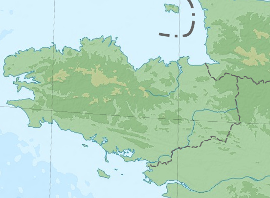 Carte topographique de la bretagne